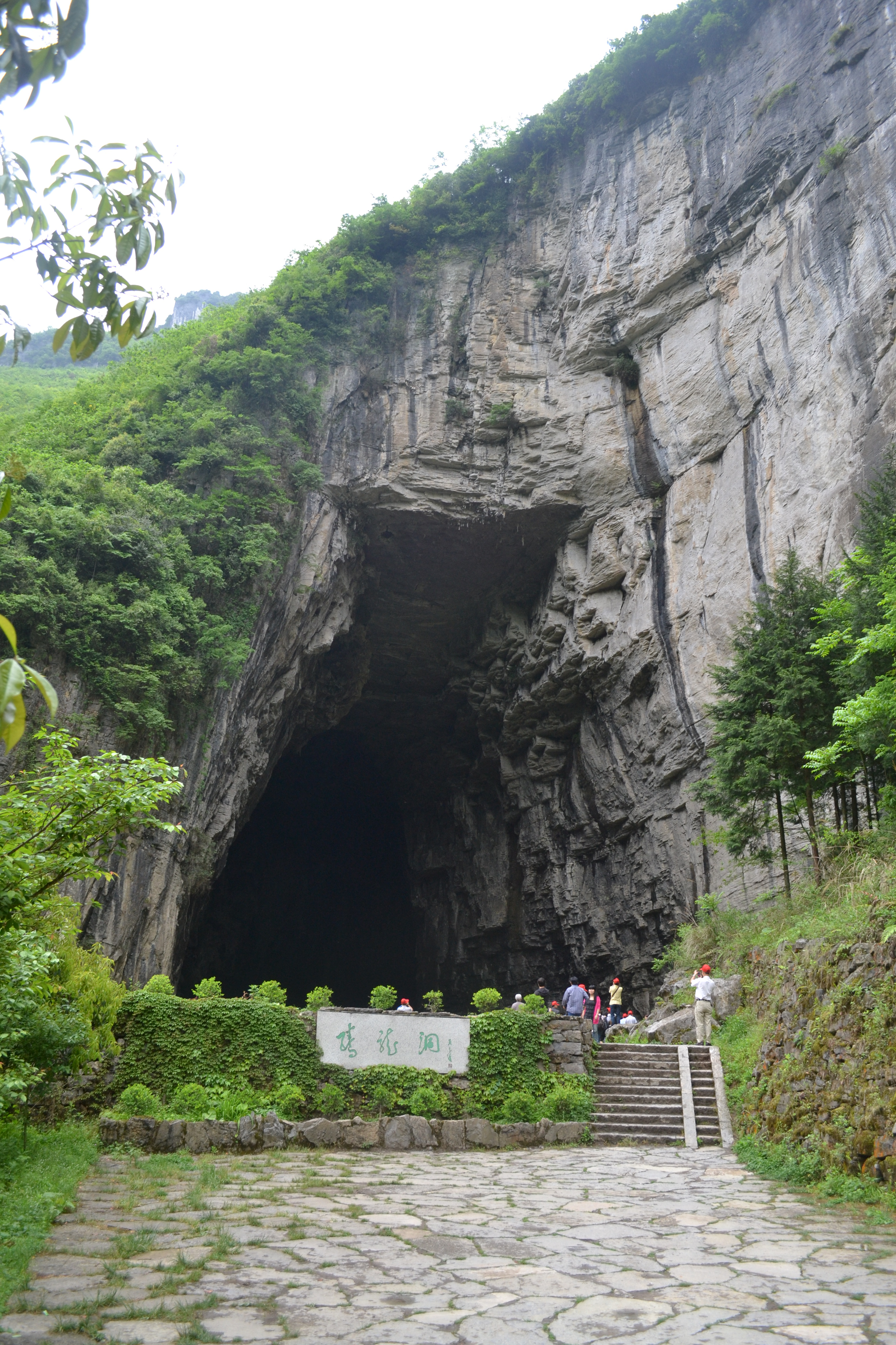 亚洲最大的溶洞-腾龙洞